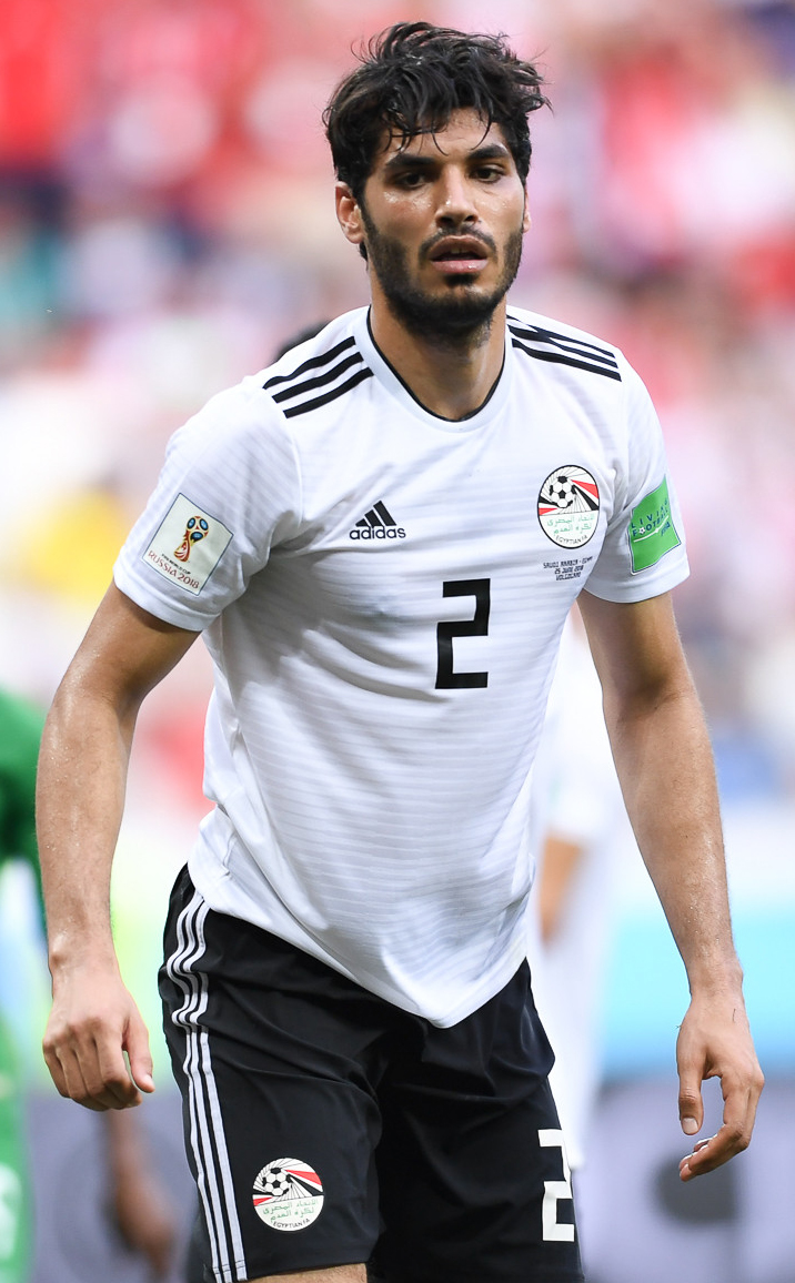 Египет с Салахом проиграл Саудовской Аравии